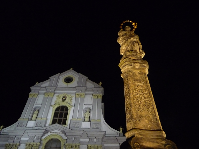 Sloup se sochou P. Marie (Opava), Dolní náměstí, Opava